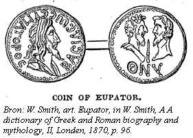 Zie bronvermelding in afbeelding.